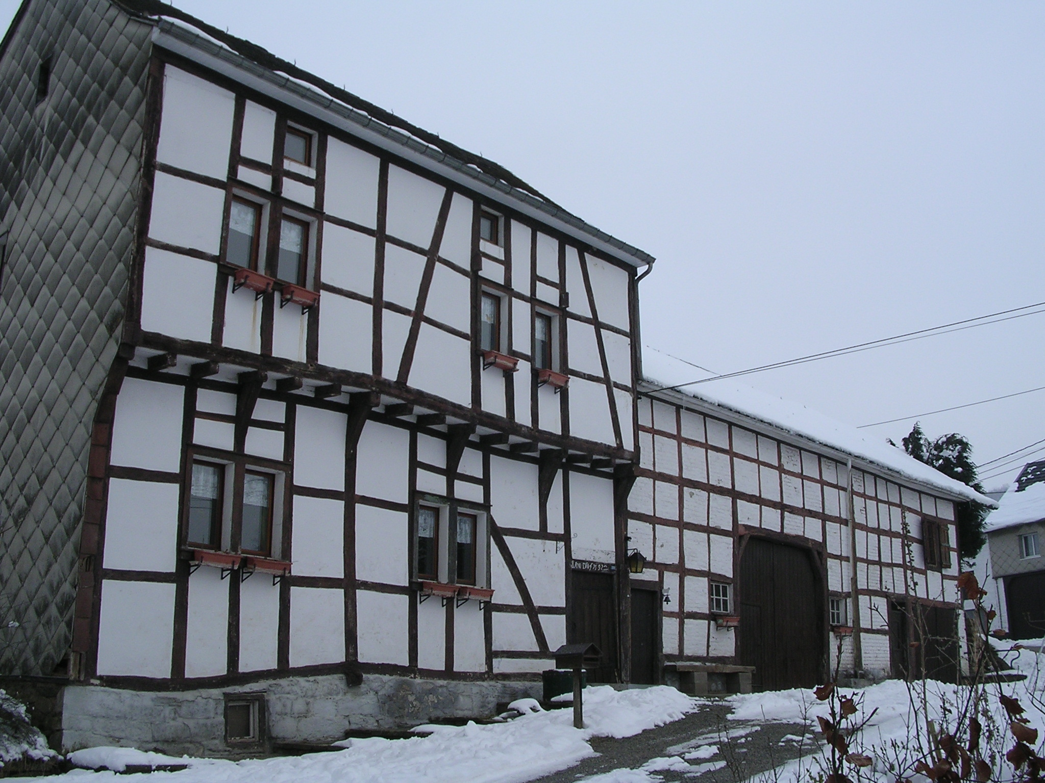 maison ancienne en pan-de-bois. Peu de maisons de ce type sont classées en Wallonie.